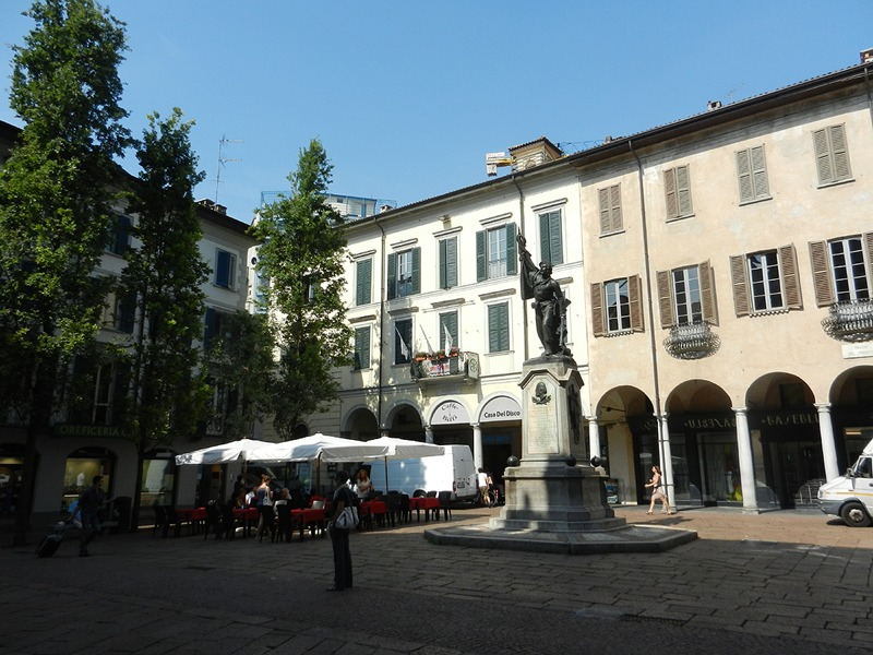 Varese - Piazza del Podestà